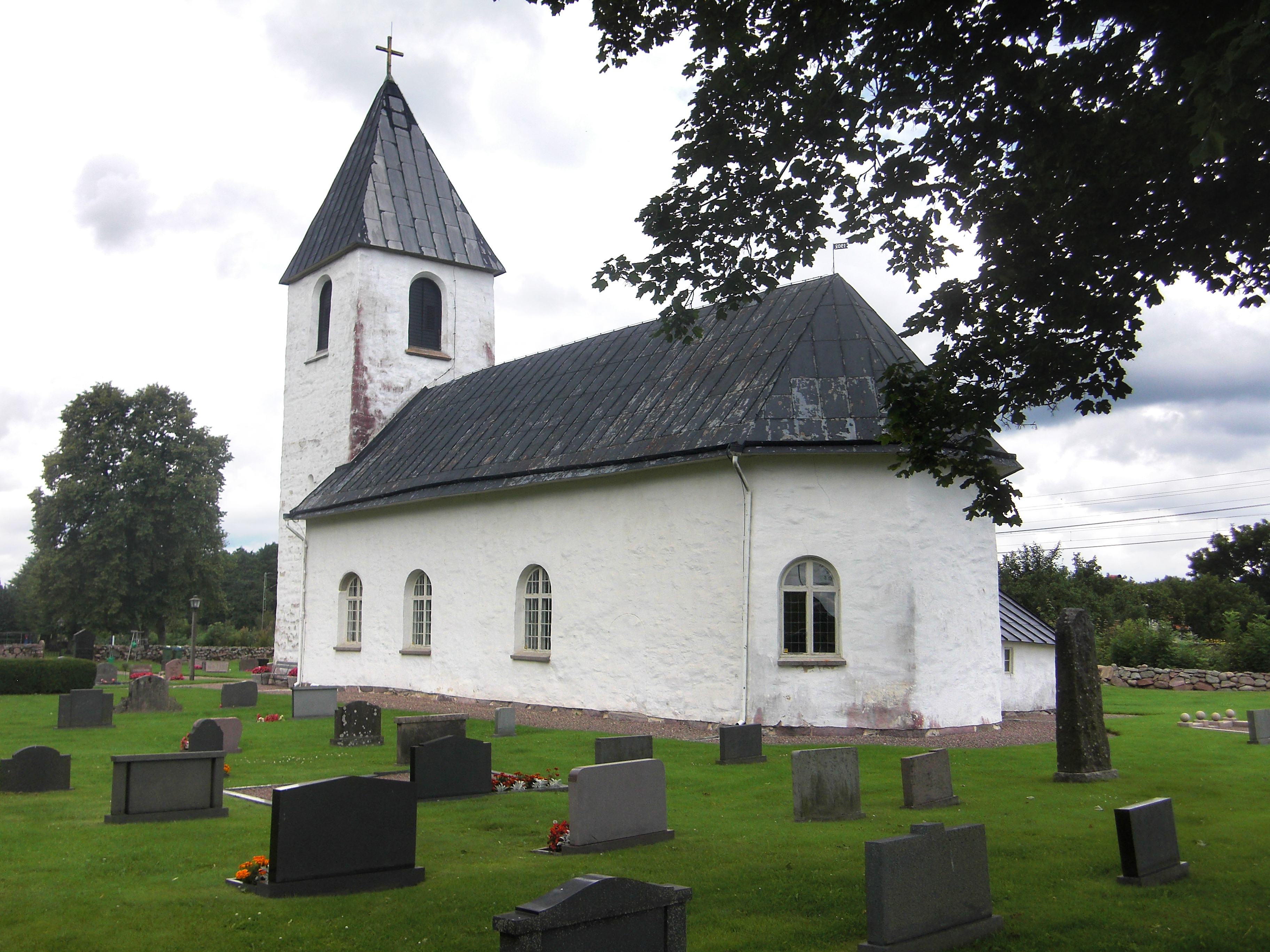 Sörby kyrka i Sörby socken, Vilske härad, Falköpings kommun, f.d. Skaraborgs län, Skara stift, Västergötland, Västra Götalands län, Sverige.